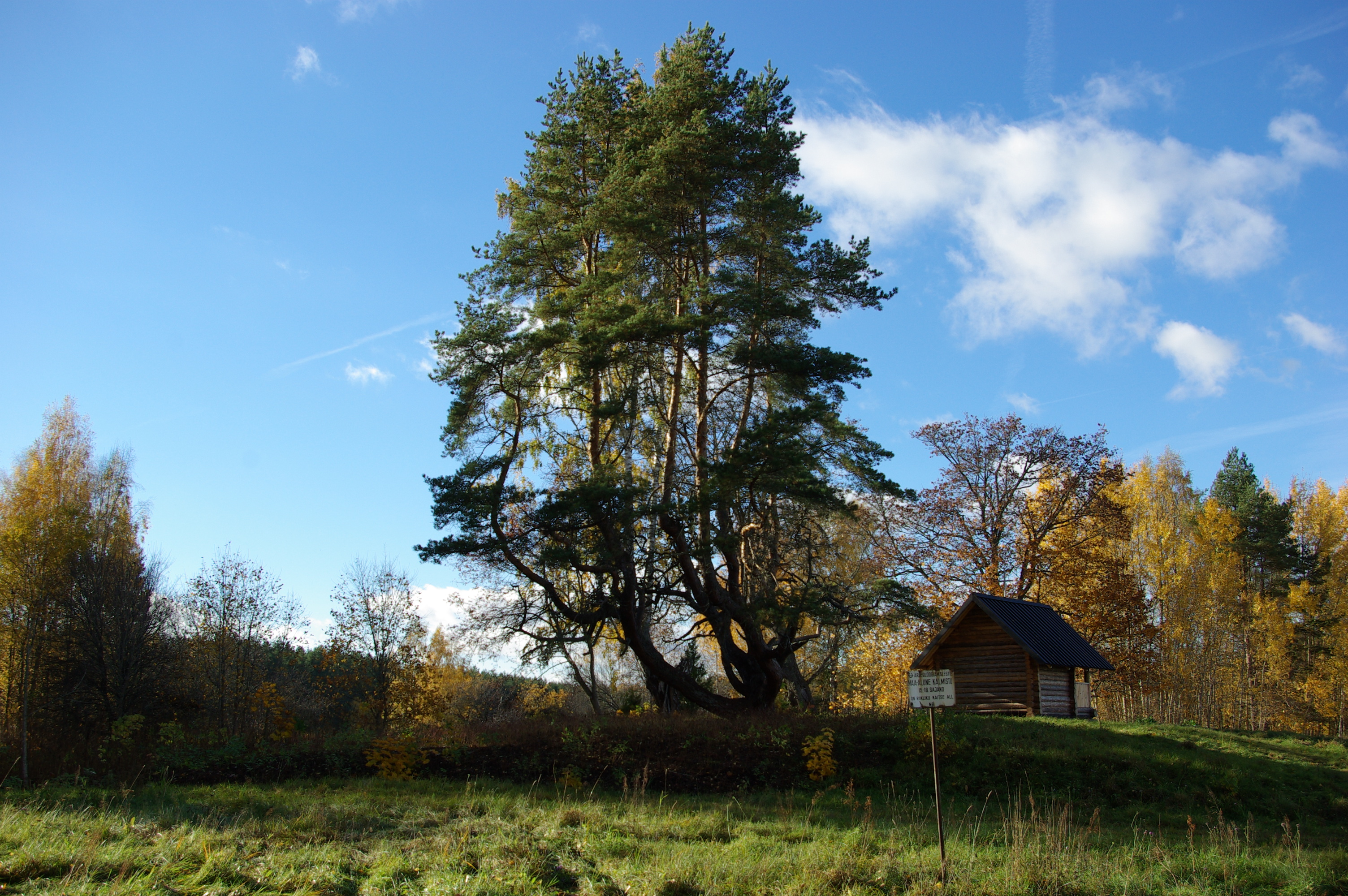 Härmä mänd